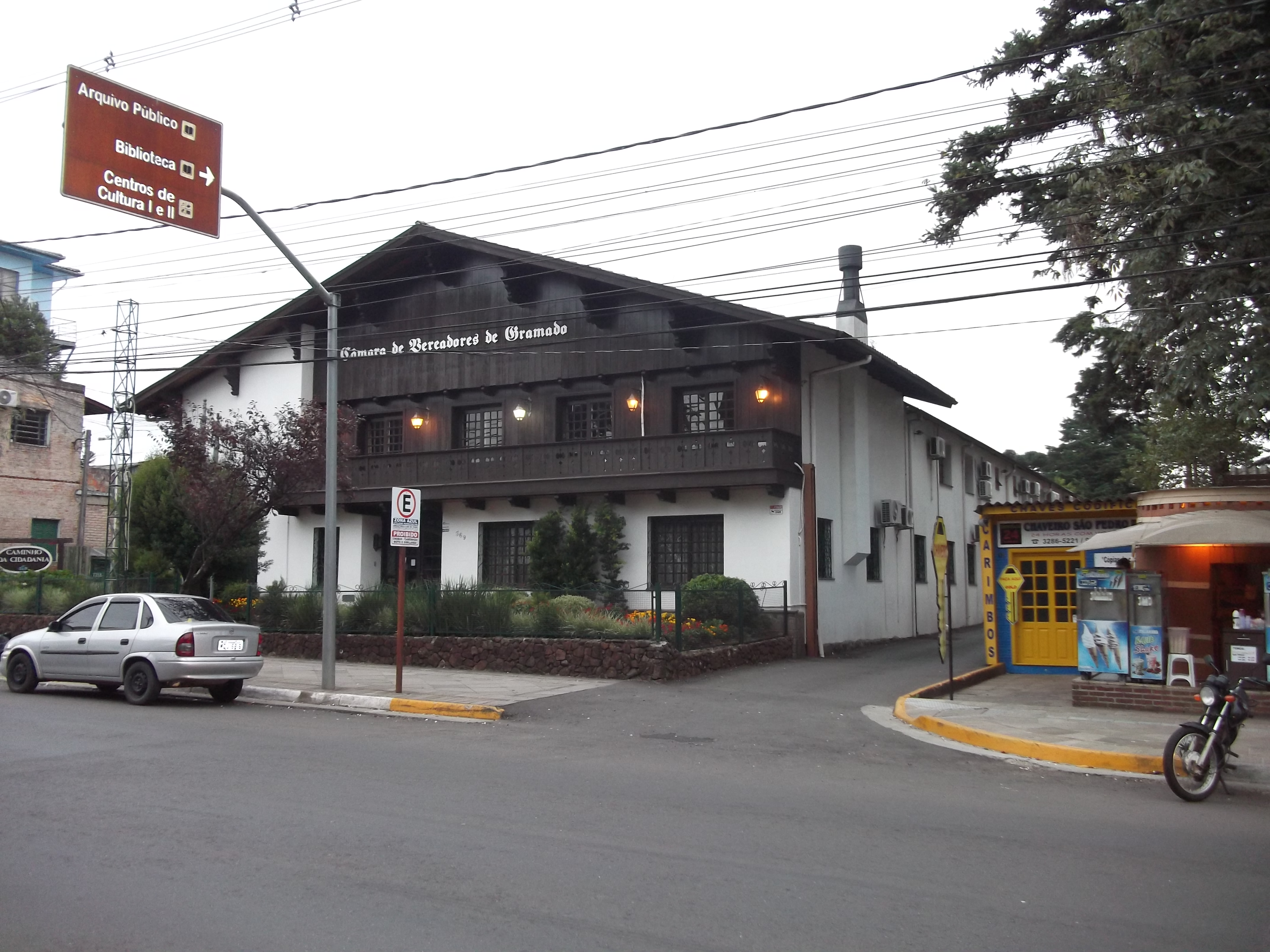 Palácio dos Festivais